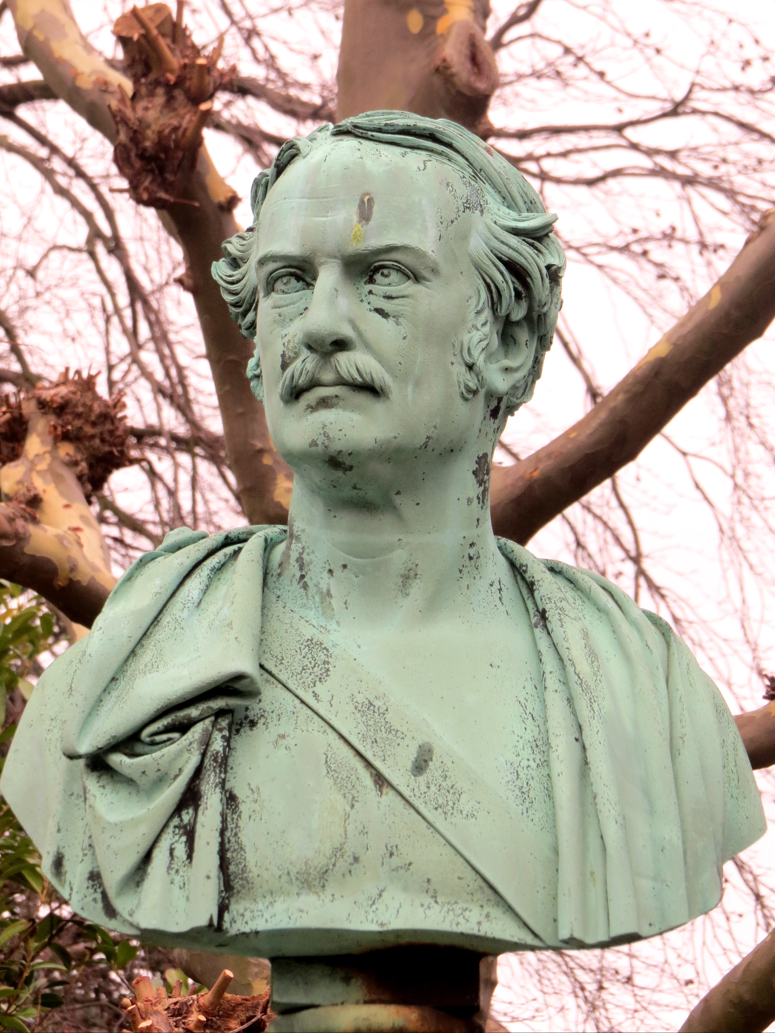 Olaf Rye (født i Bø i Telemarken 1791, død ved Fredericia 1849) med feltherrekappe og sværdrem i bronze på fodstykke af norsk granit, buste på Garnisons Kirkegård, København